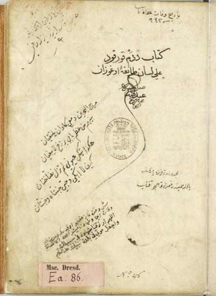 تۆرکجه: دده قورقود کیتابین ایلک صفحه سی - درسدن نوسخه سی